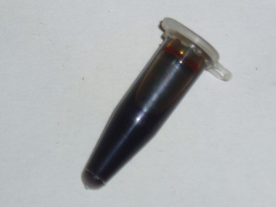 Fotka jódu rozpuštěná v ethanolu. Vlastní fotografie, volné použití...